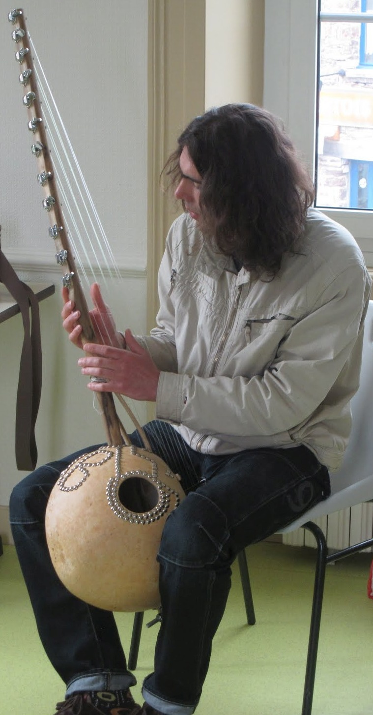 Stage kamele ngoni de Abou Diarra- Decembre 2011 - St Peran, Bretagne